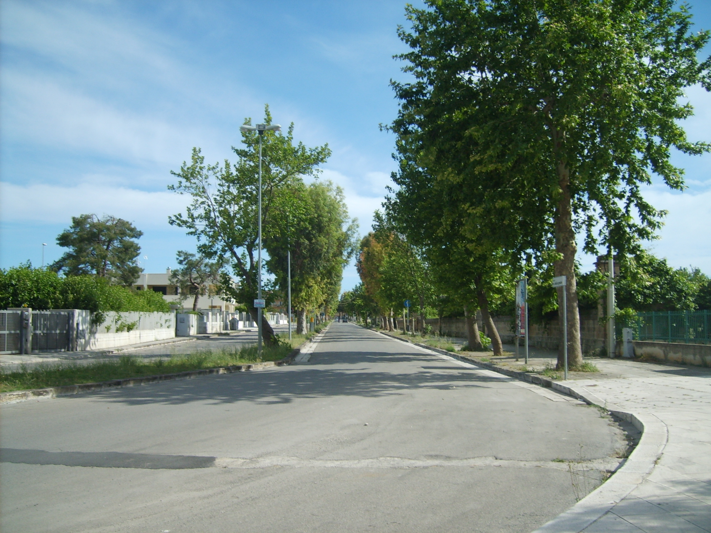 Viale Madonna delle Grazie, Francavilla Fontana